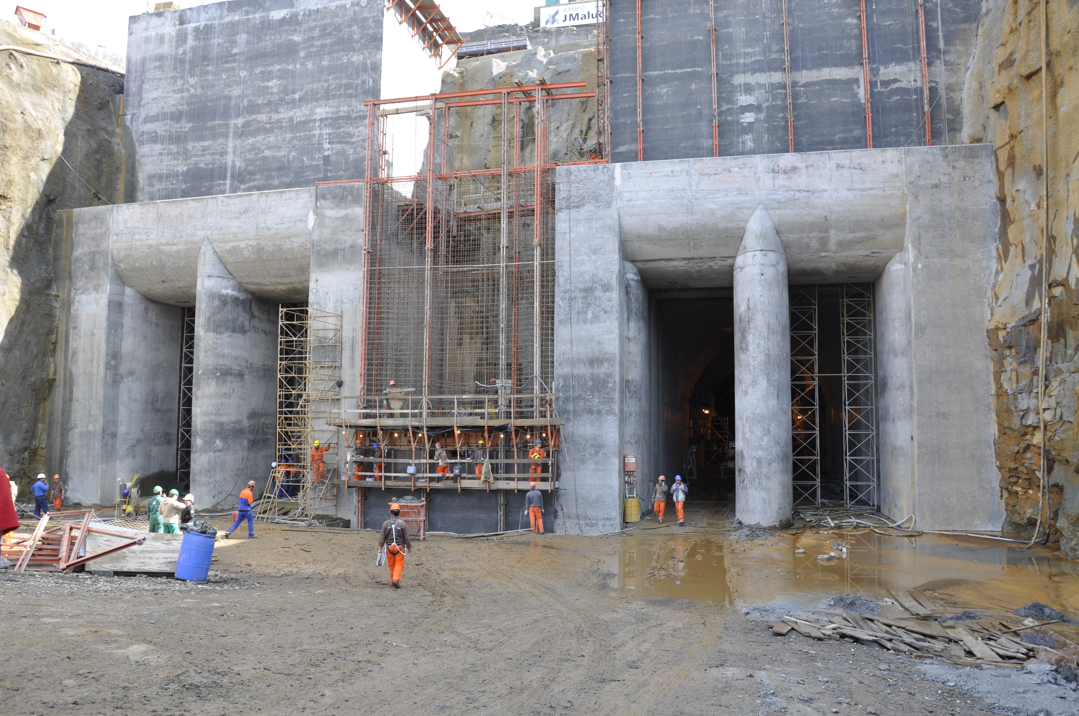 Entrada tunel para desvio do rio. Usina Mauá (Eletrosul/Copel).